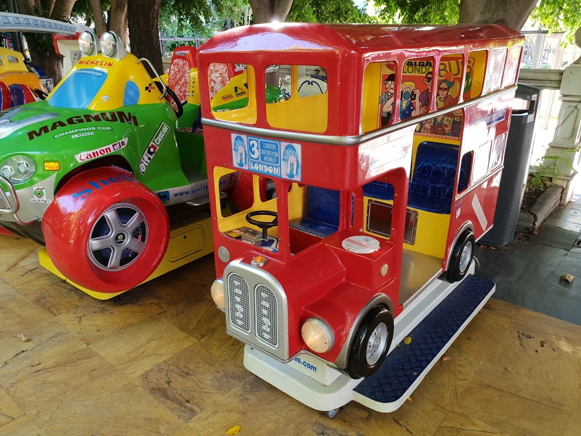 Kiddie ride infantil en Avenida del Mar, Marbella.